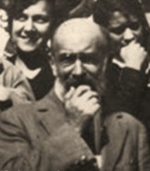 Théodore Simon em Belo Horizonte (Brasil) em 1928.